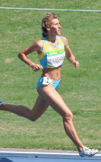 Atleta participando das Olimpíadas Rio2016.